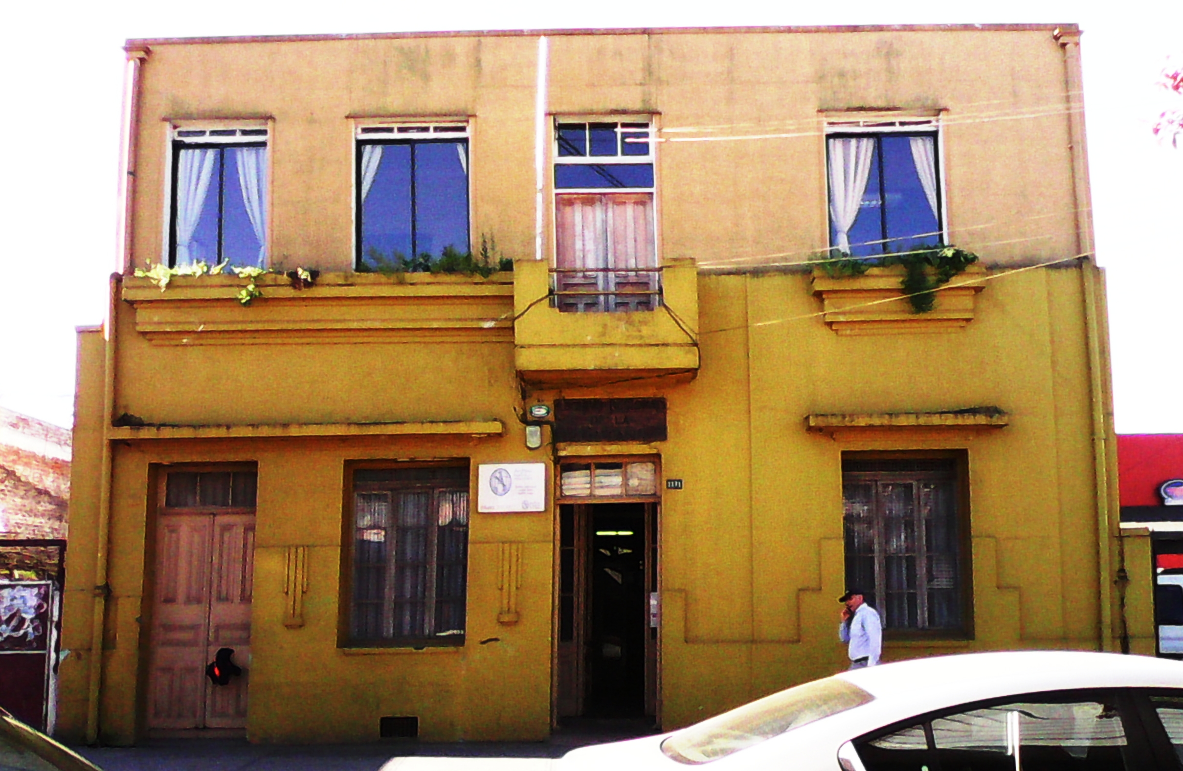 Edificio del Archivo Regional de La Araucanía, ubicado en el sector Centro de la ciudad de Temuco, Chile.